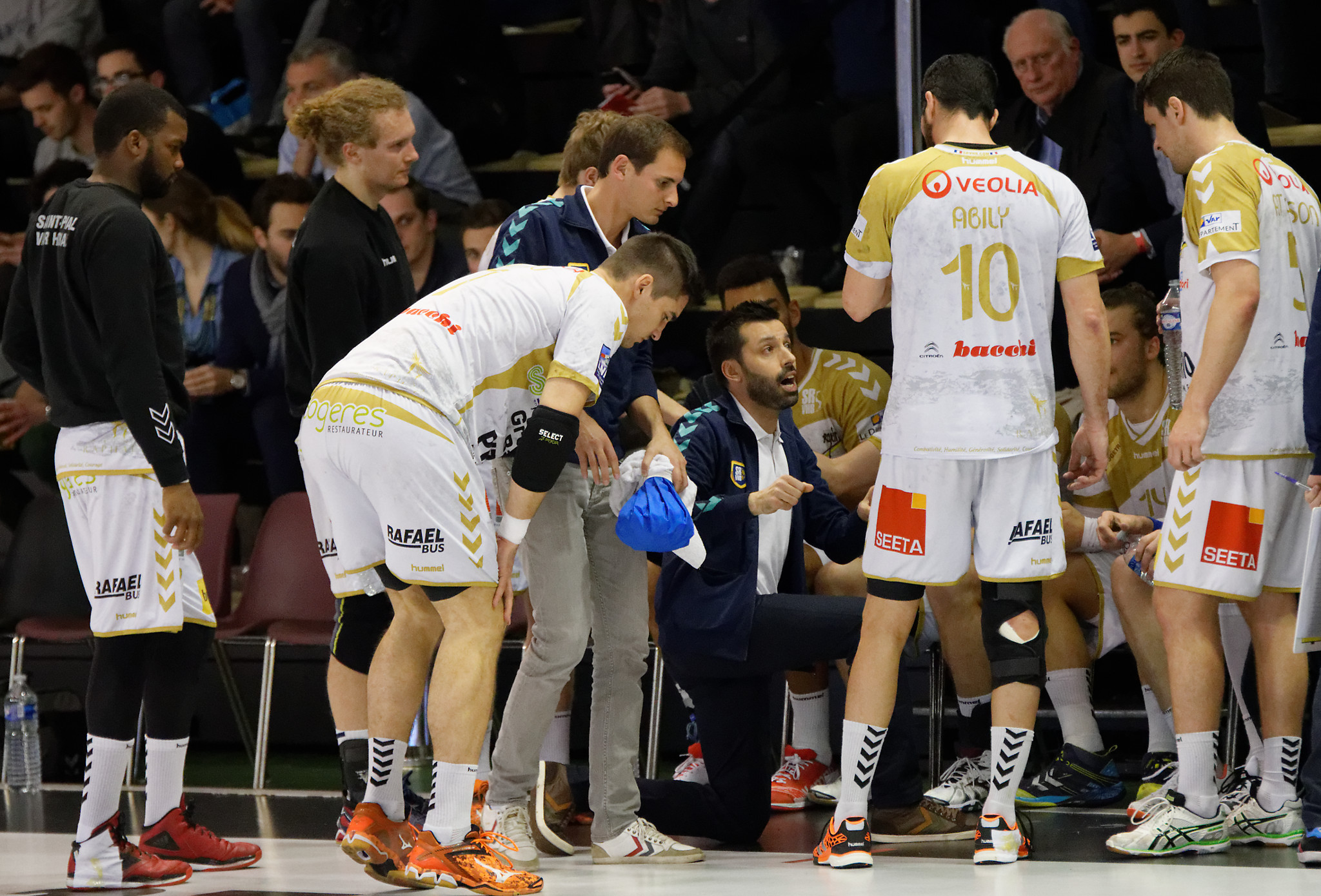 Ivry - Saint-Raphaël lors de la 19e journée du championnat de France de handball masculin le 23 mars 2016 au gymnase Auguste Delaune à Ivry sur Seine.